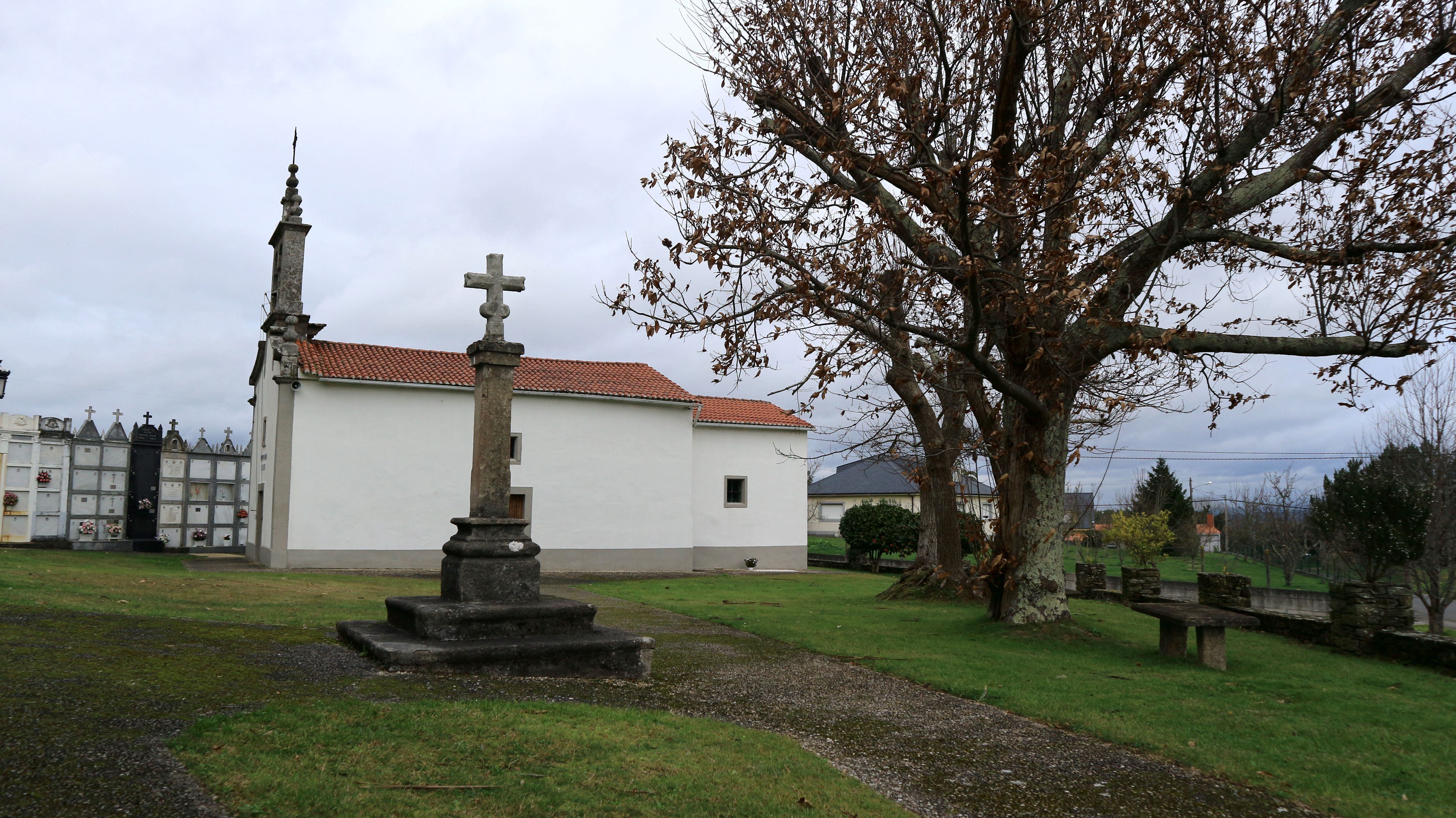 Igrexa de San Salvador de Cerneda. En Cerneda, Abegondo.